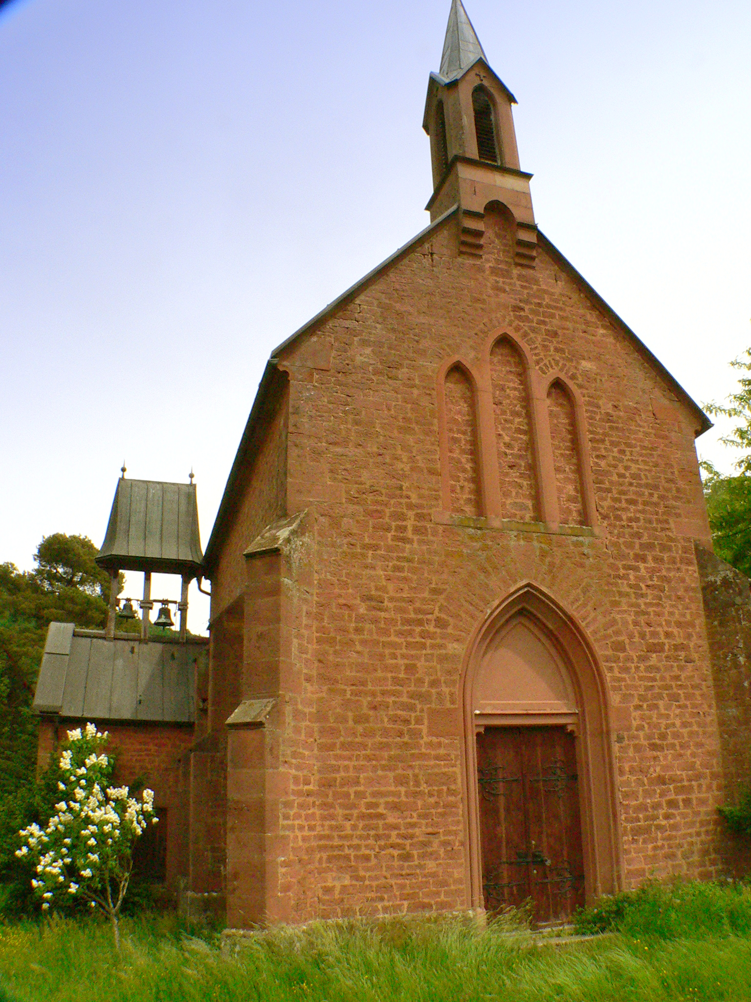 Kapelle in Hafenlohr (Ortsteil Einsiedel) im Spessart, Deutschland